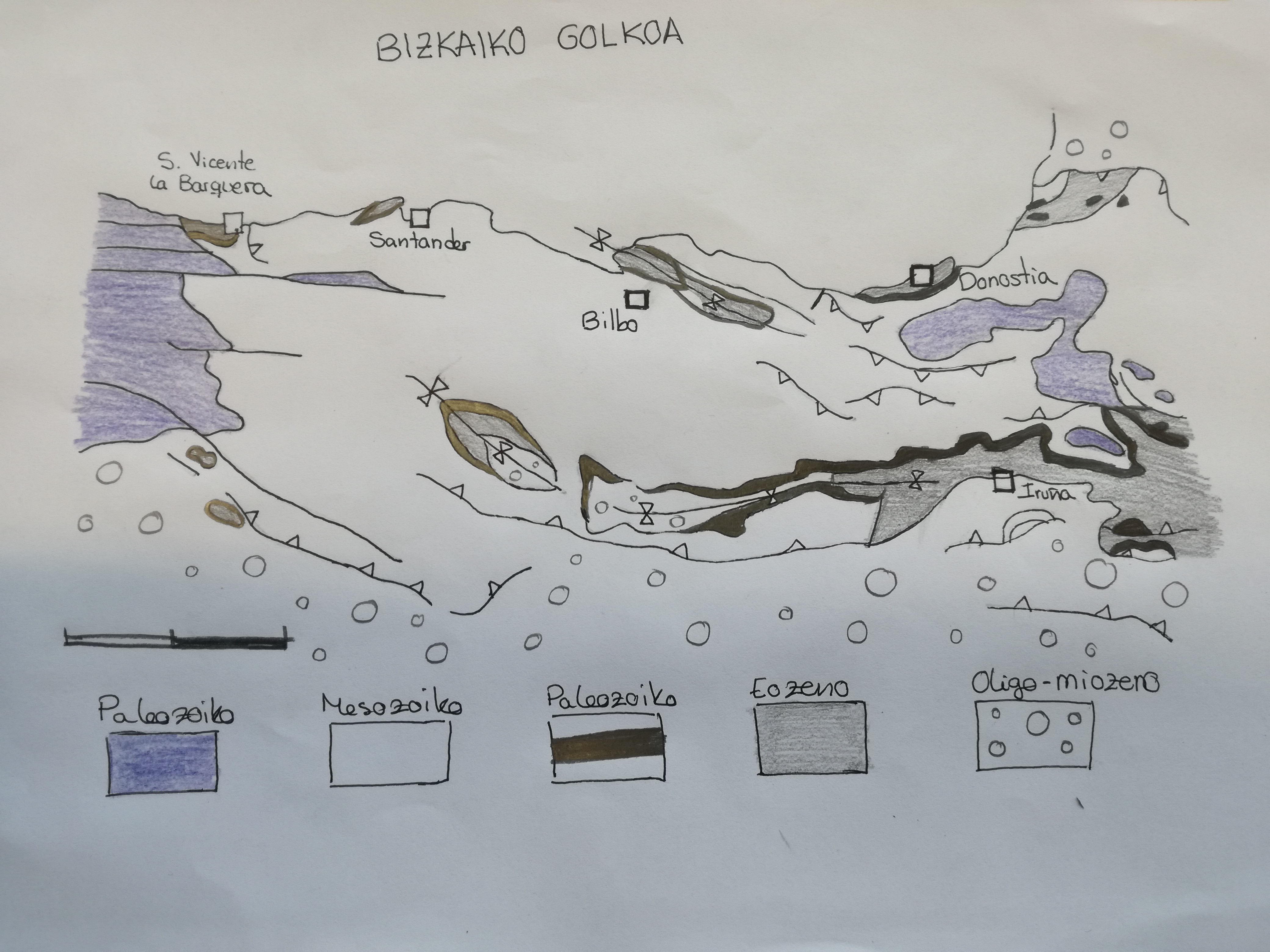 Eusko-Kantauriar arroko kokapen geologikoa.